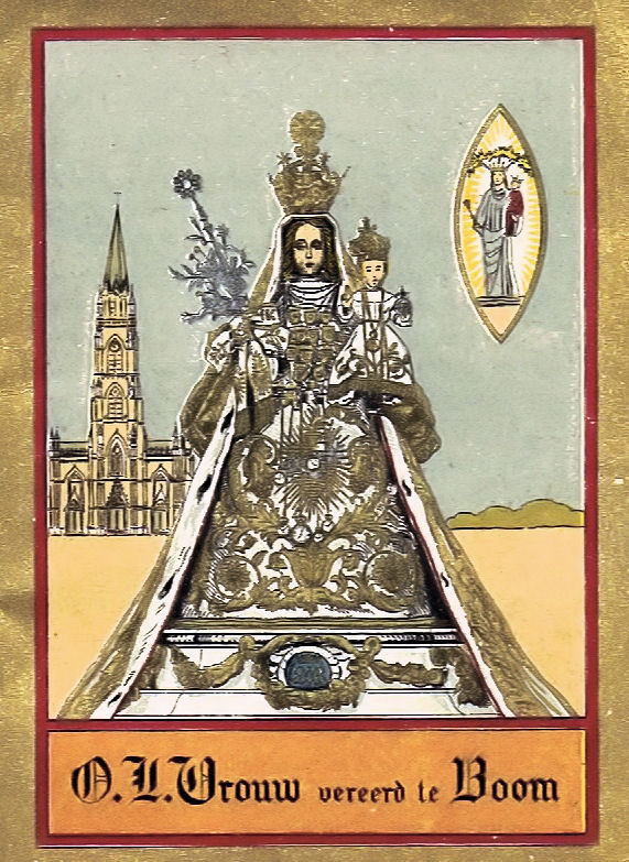 Litho OLV van Boom, ca.1910